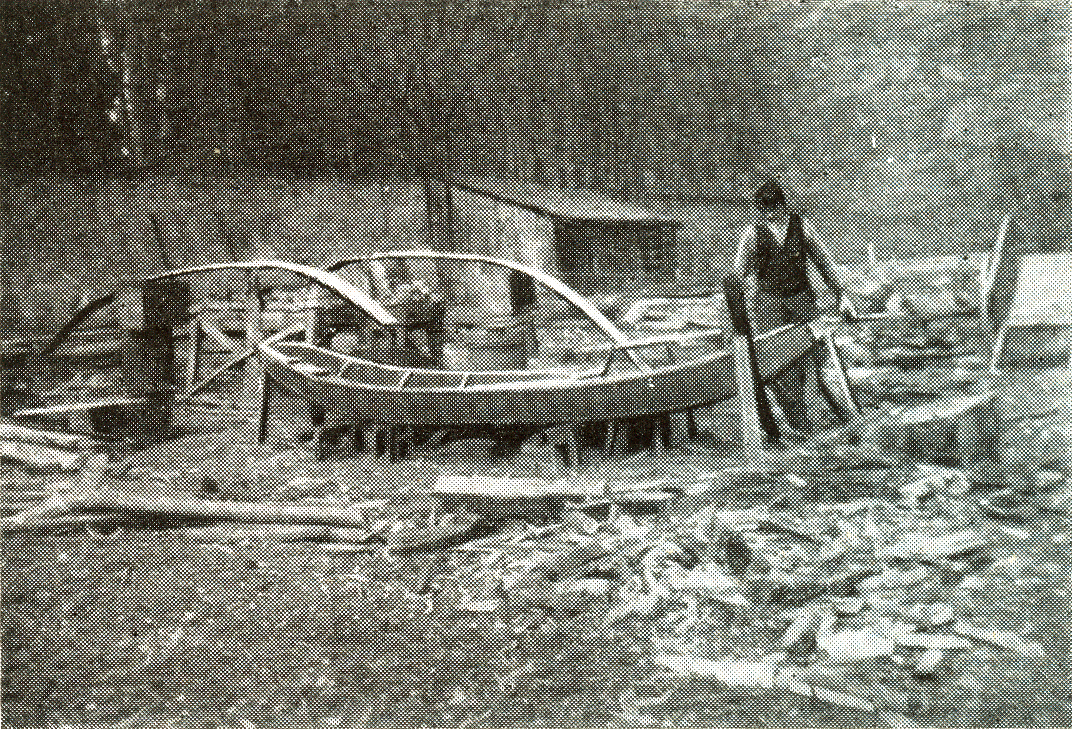 Iechternacher Schaffbauer bei der Aarbecht (1908)